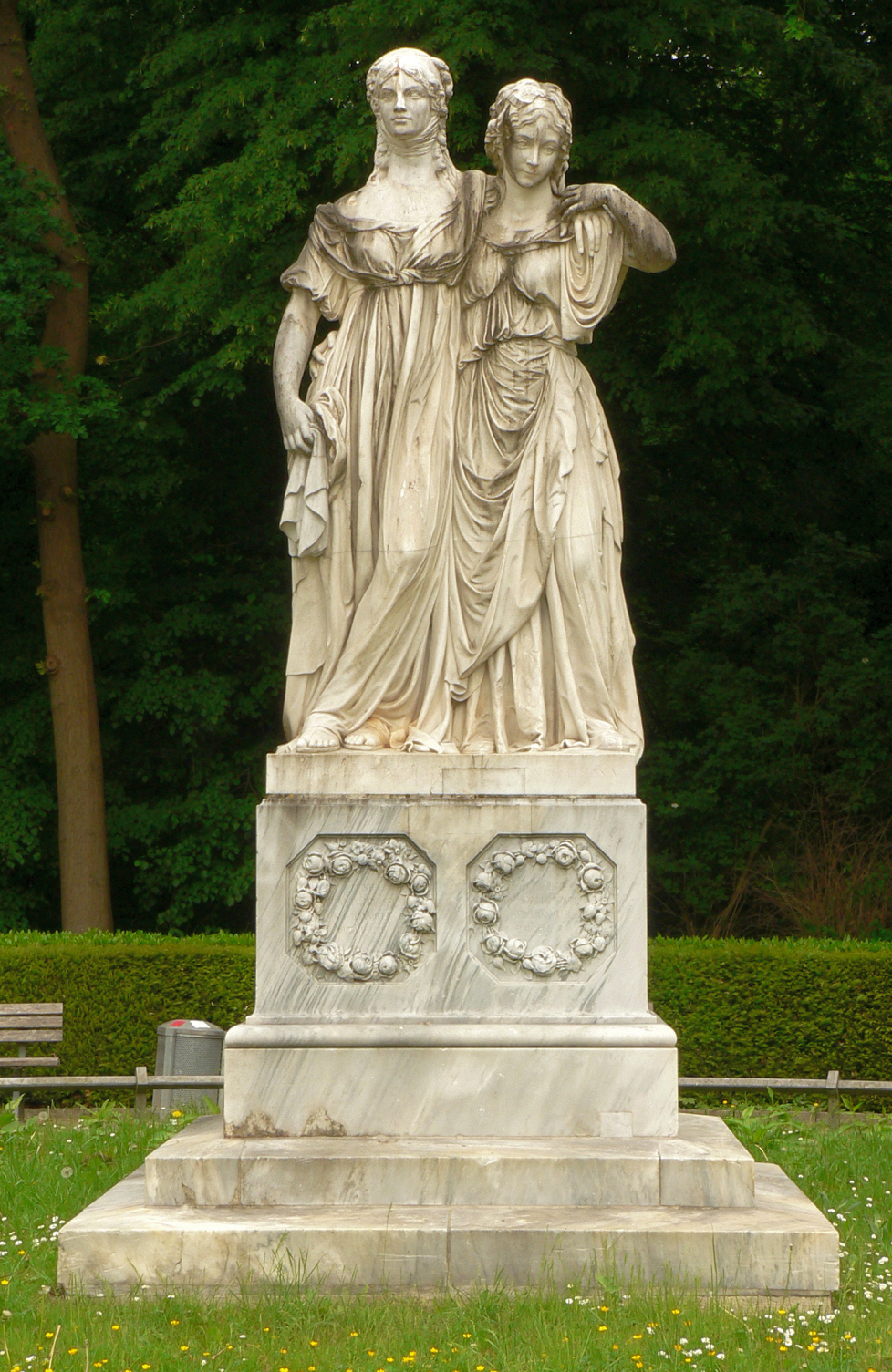 Königinnendenkmal